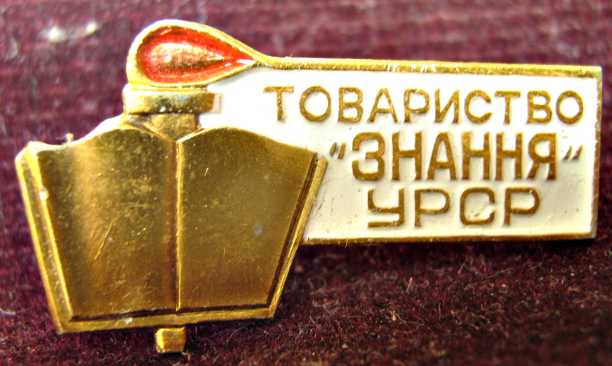 Значок украинского республиканского общества "Знание".